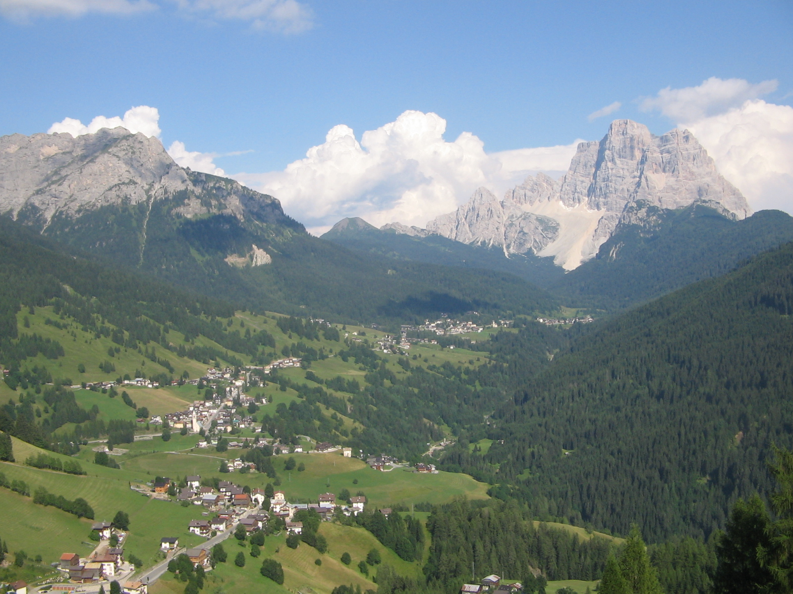 Val Fiorentina, Dolomiti bellunesi, Italy